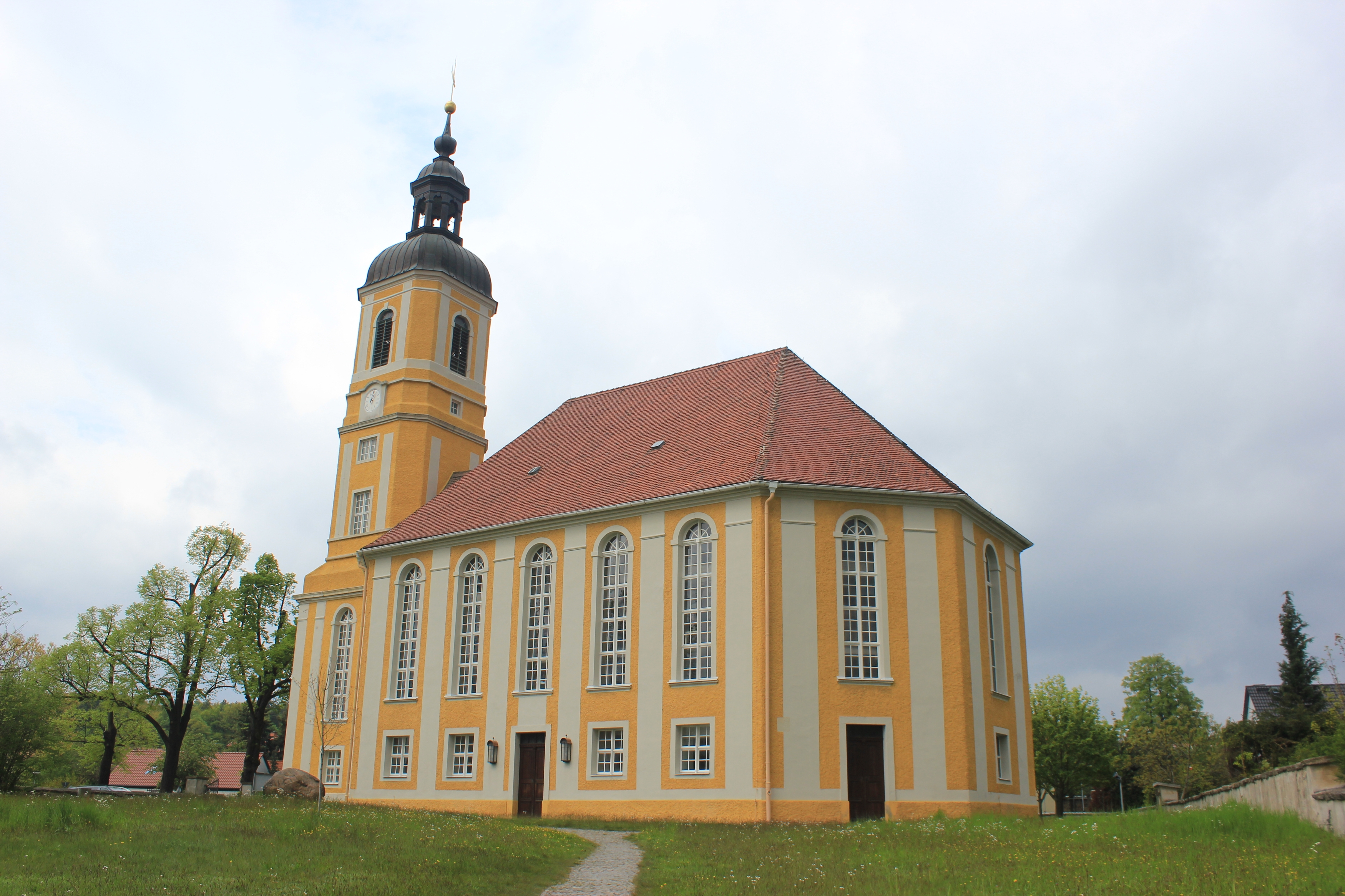 Hornjoserbsce: Wóslinčanska ewangelska cyrkej.